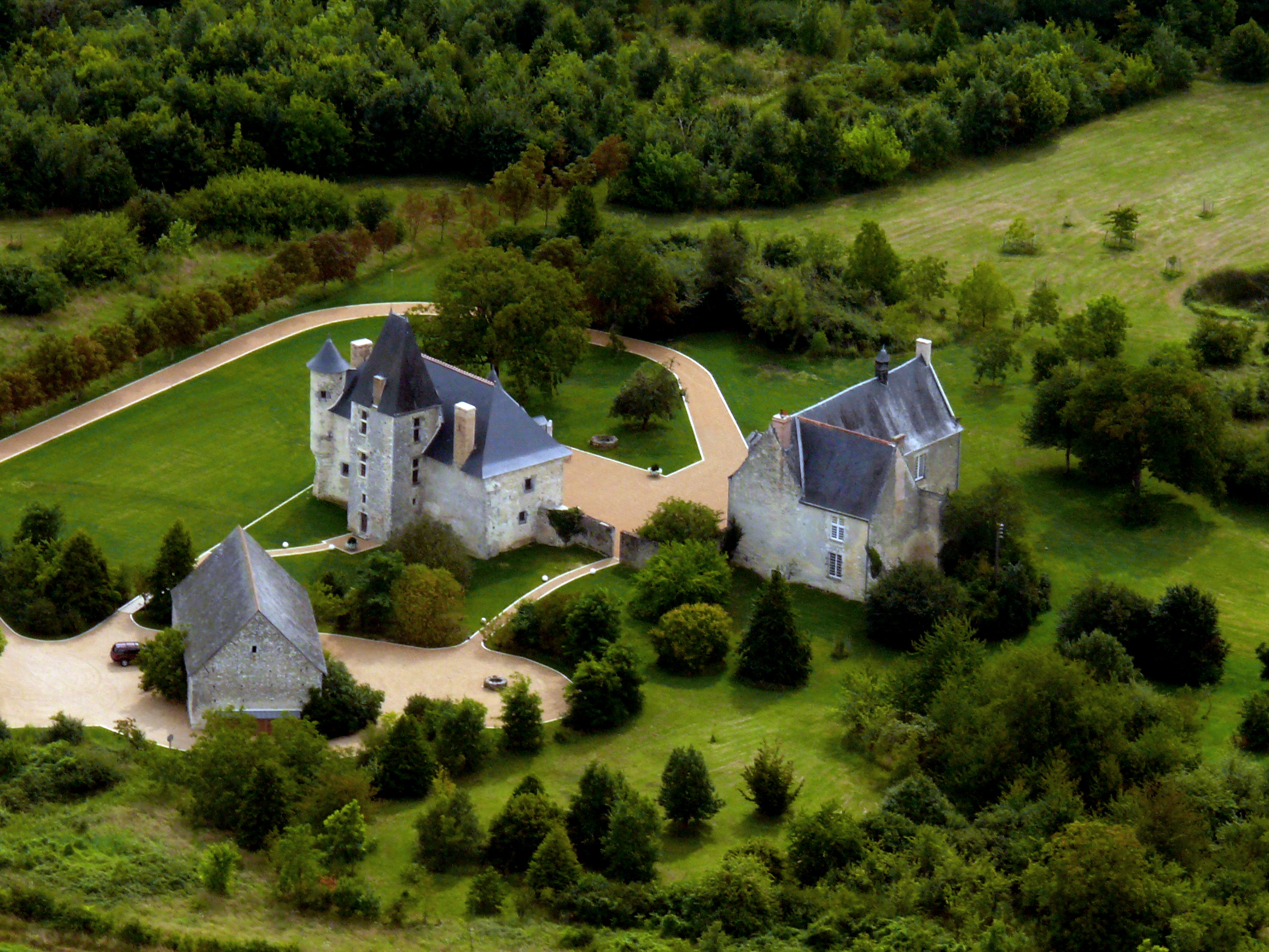 Genneteil - Breil de Foin - Vue aérienne